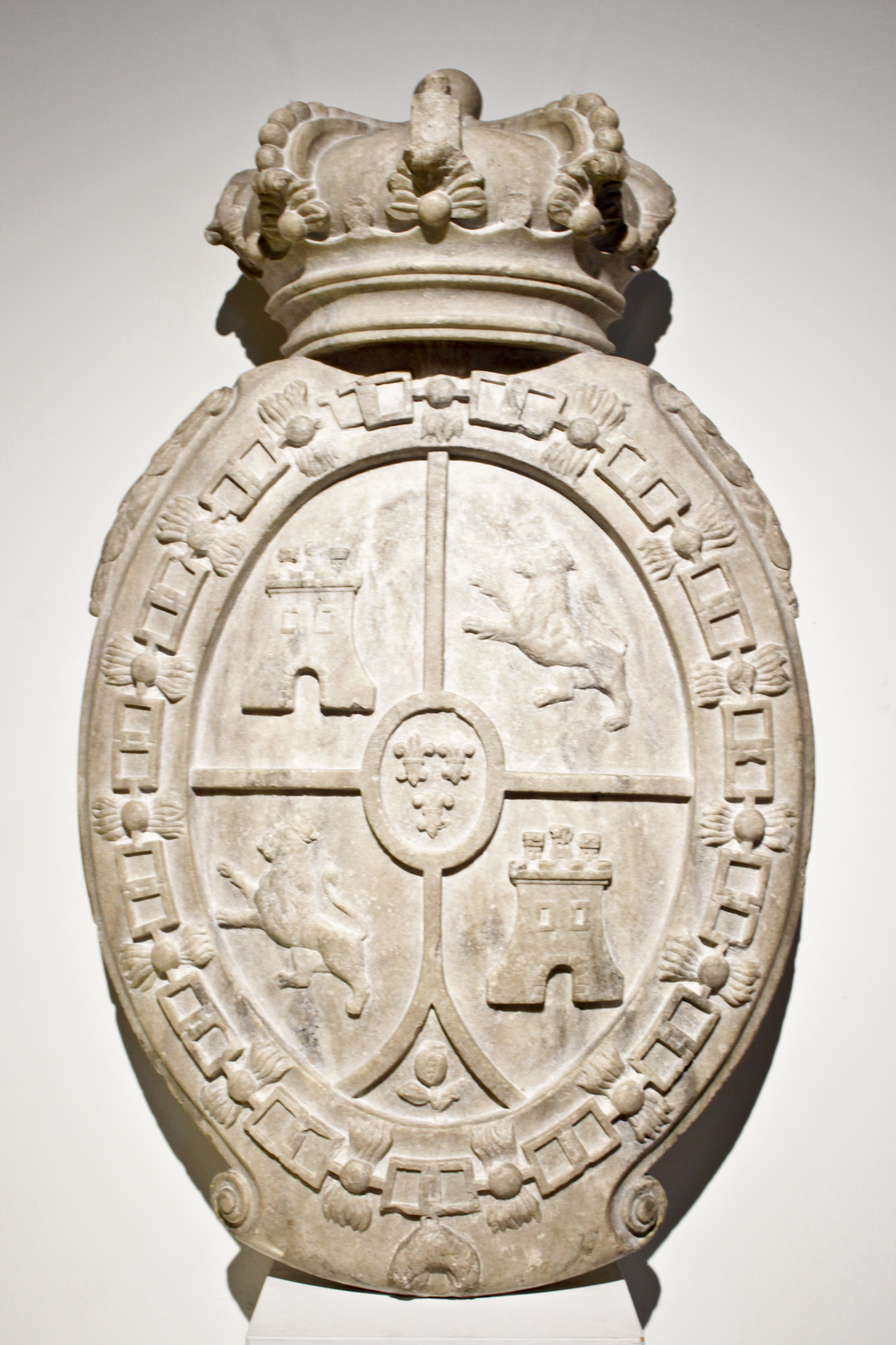 Escudo que perteneció al Fuerte de Buenos Aires, realizado en mármol, en exhibición en el Museo del Bicentenario.